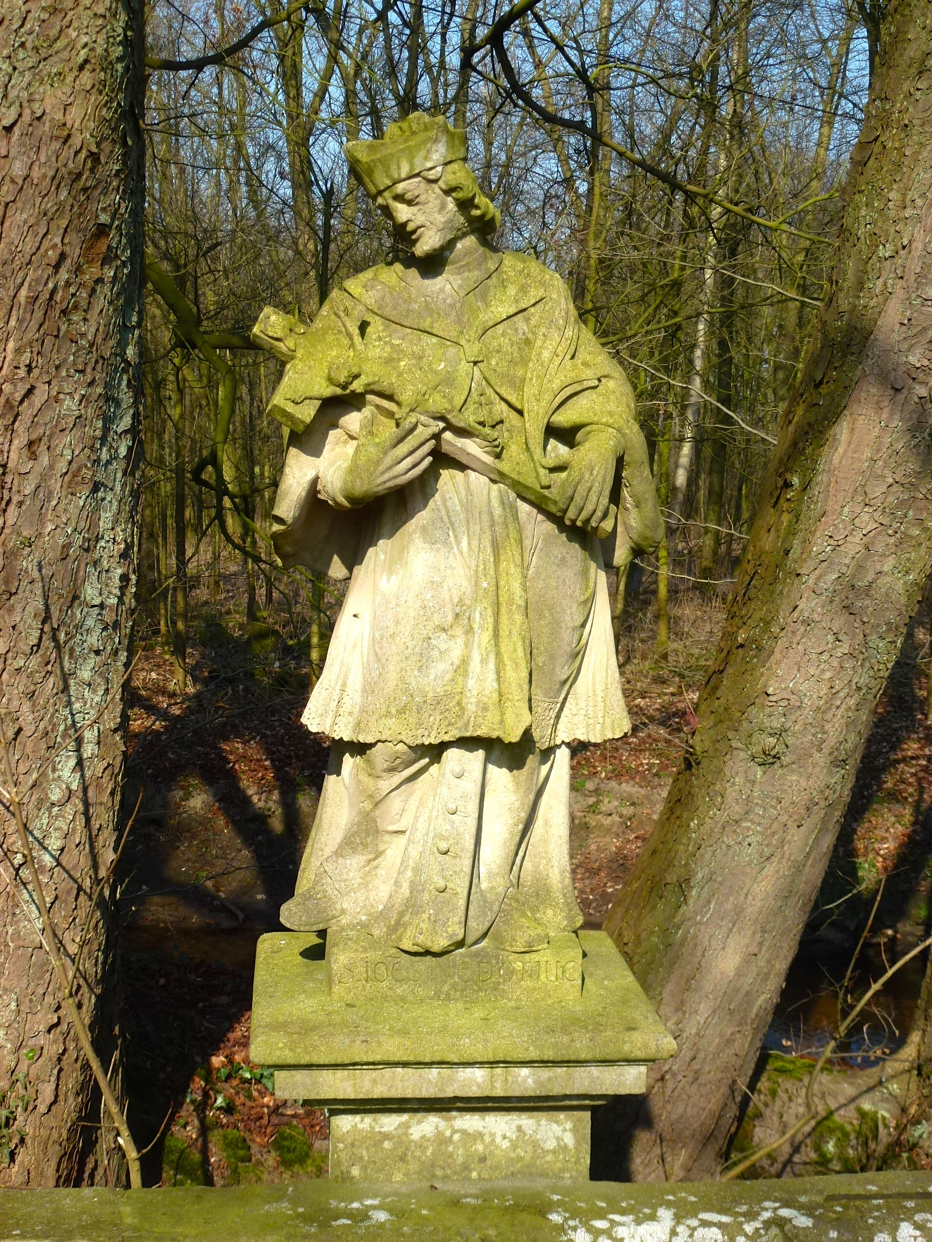 Statue im Waldgebiet an der Gräfte